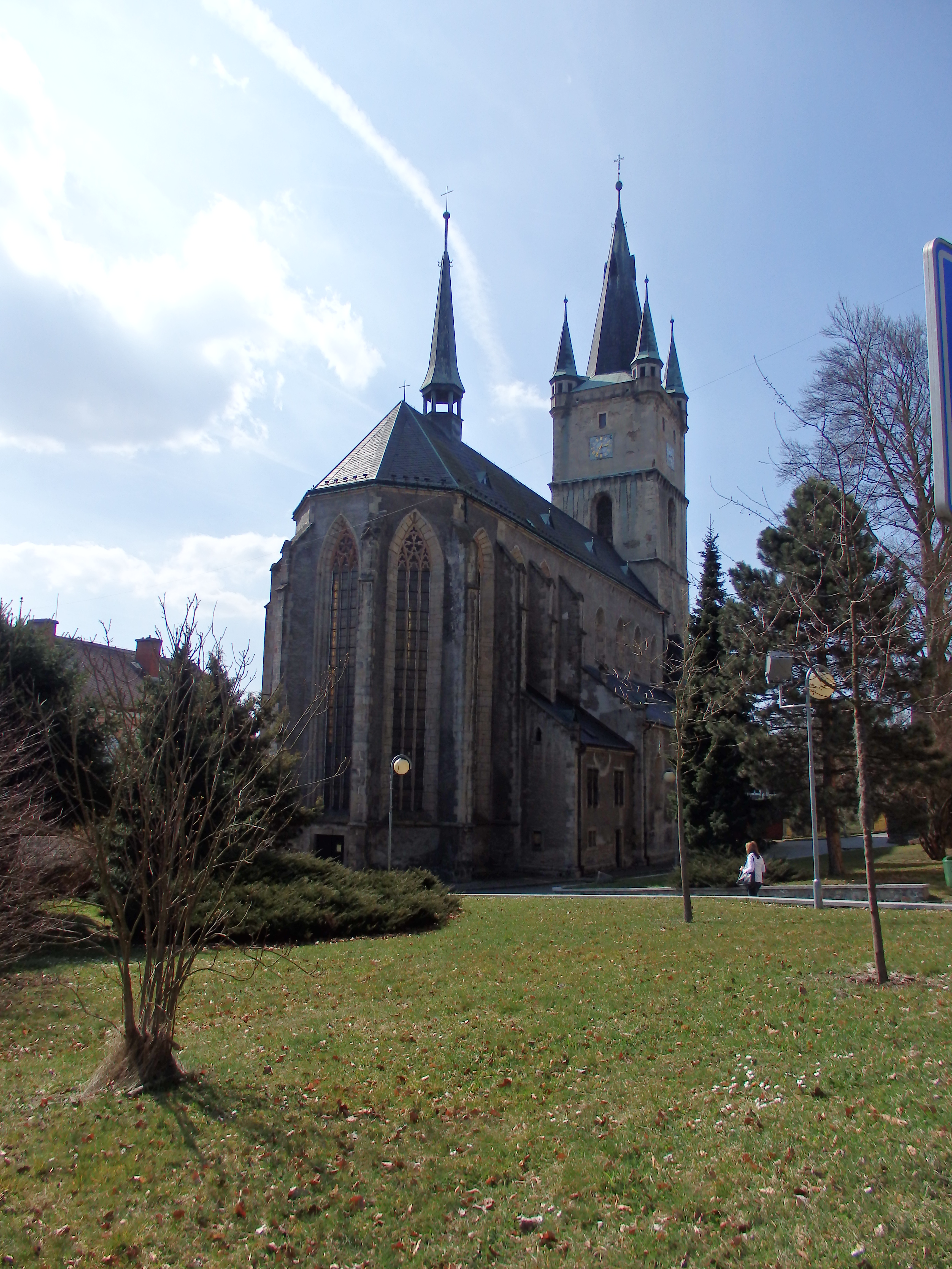 Kostel Nanebevzetí Panny Marie v Tachově